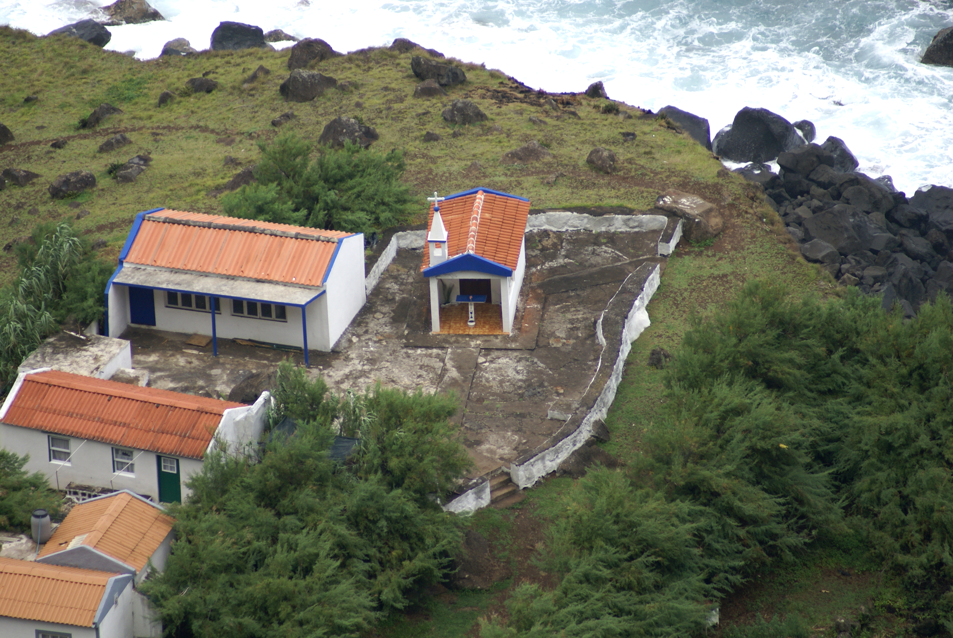 Fajã de João Dias, Ermida de São João Evangelista, Rosais, Velas, ilha de São Jorge, Açores